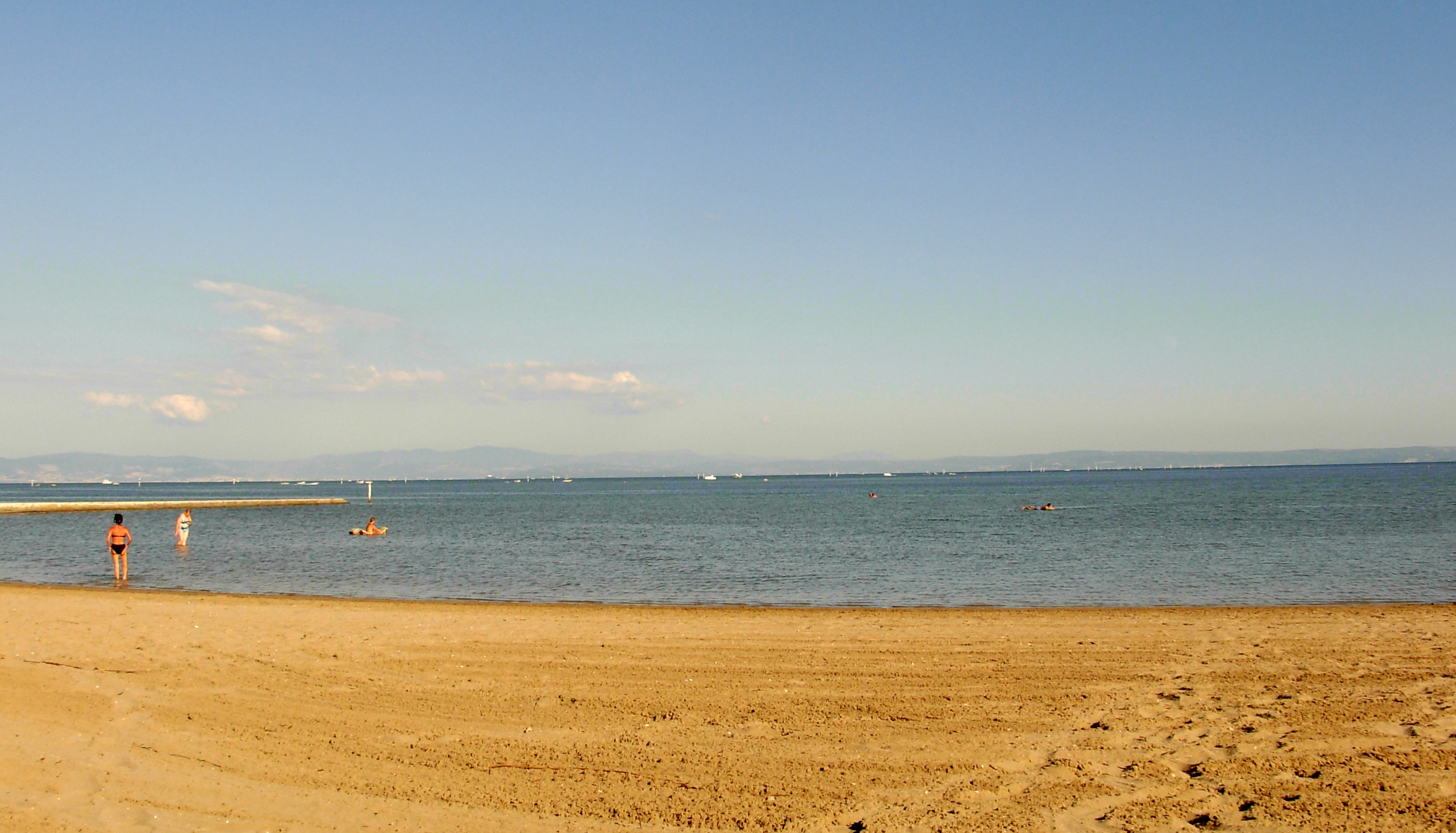 Adriatic sea near Grado